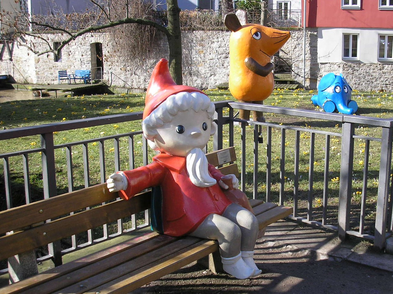 Figuren des Kinderfernsehens auf der Rathausbrücke in Erfurt (Thüringen). Vorn auf der Bank: Sandmännchen, in der Mitte die Maus und rechts der Elefant (beide aus der Sendung mit der Maus). Alle drei Figuren wurden an einem neuen Standort aufgestellt.